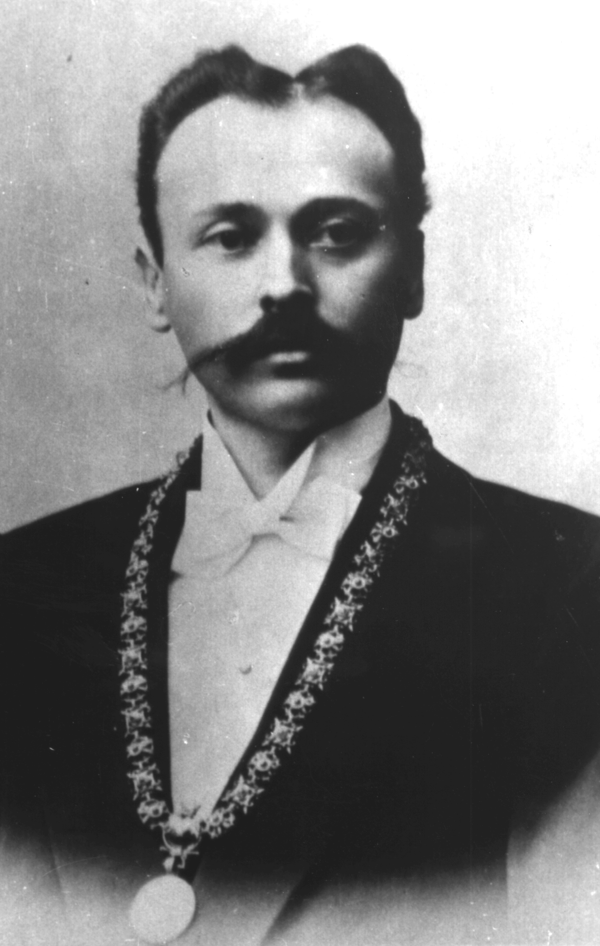 Der Freisinger Oberbürgermeister Stephan Bierner (amt. 1899-1933) mit Amtskette am Anfang seiner Amtszeit, Fotografie um 1900, Stadtarchiv Freising.